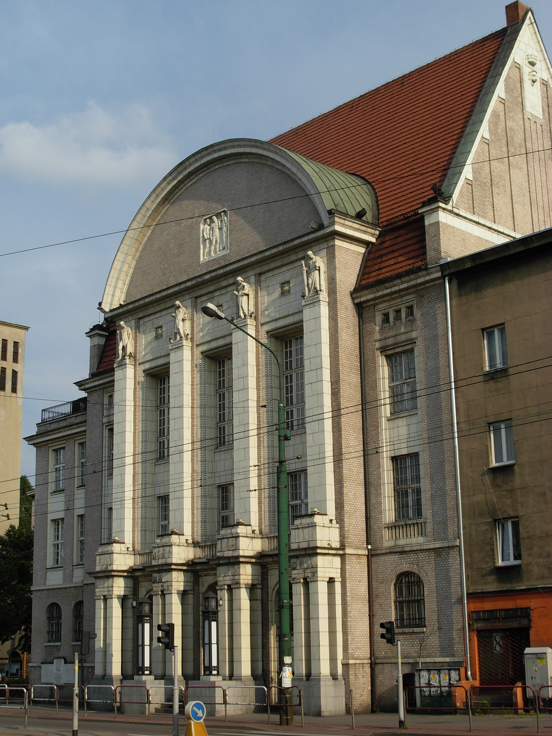 Katowice Bogucice, ul. 1 Maja 50 - dawny Ratusz w Bogucicach, obecnie rektorat Uniwersytetu Ekonomicznego (zabytek nr A/1234/78 z 19.08.1978)